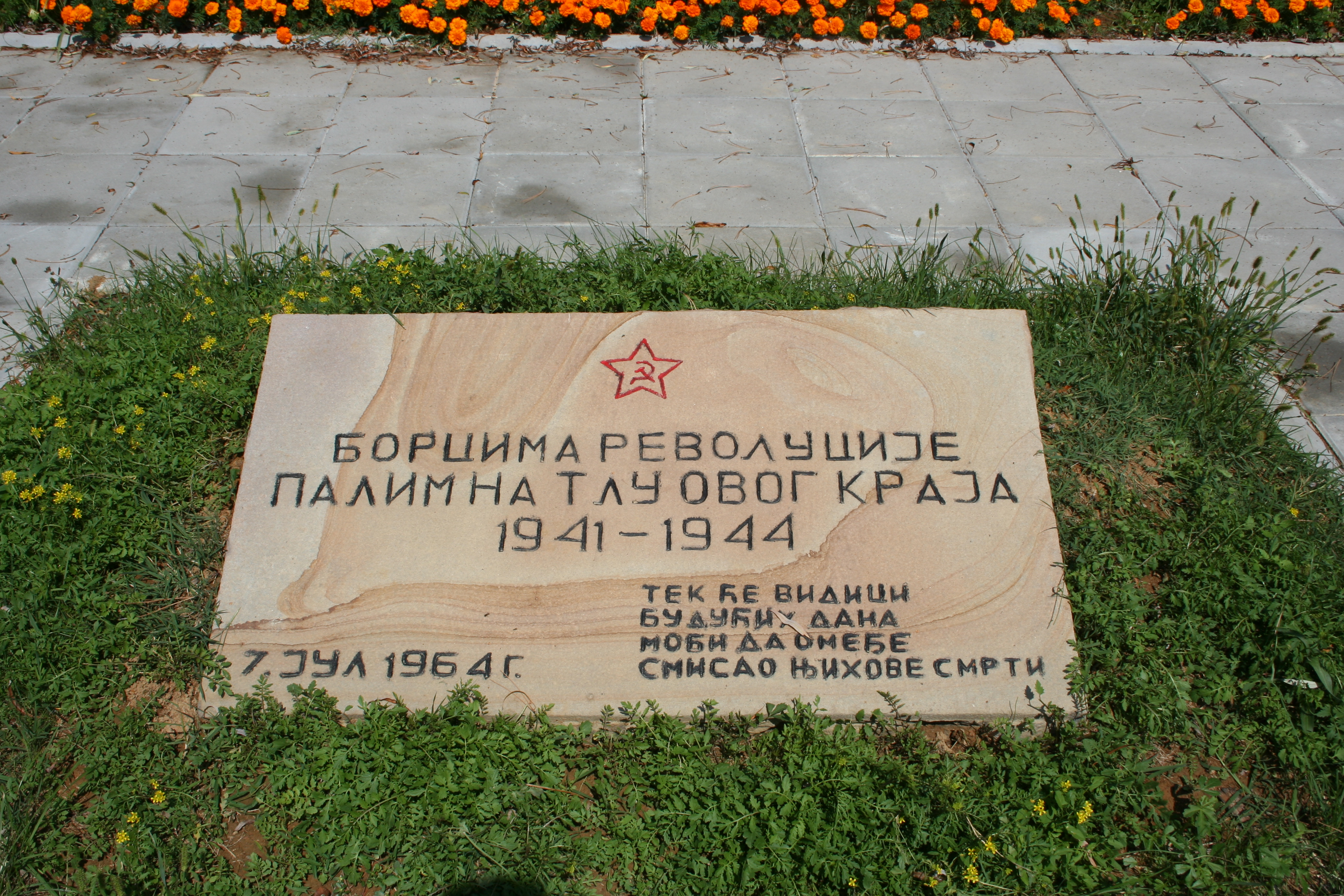 Spomen groblje na Krušiku, Valjevo